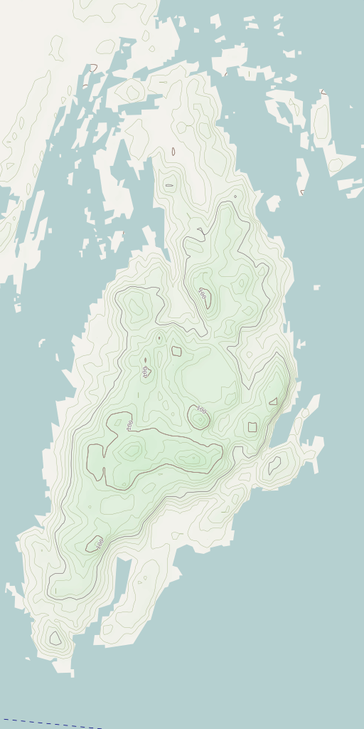 Île du Petit Mécatina, Québec, Canada